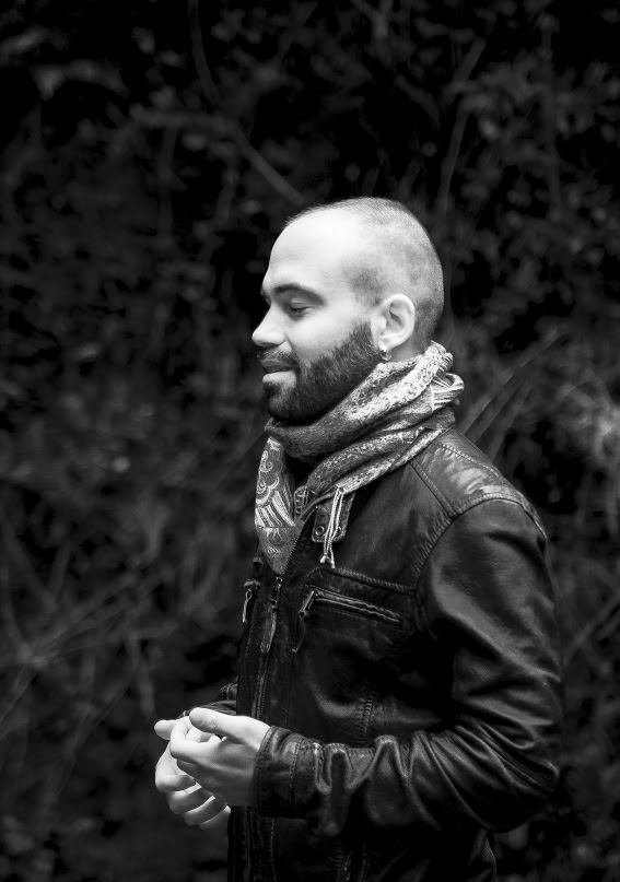 Julen Axiari